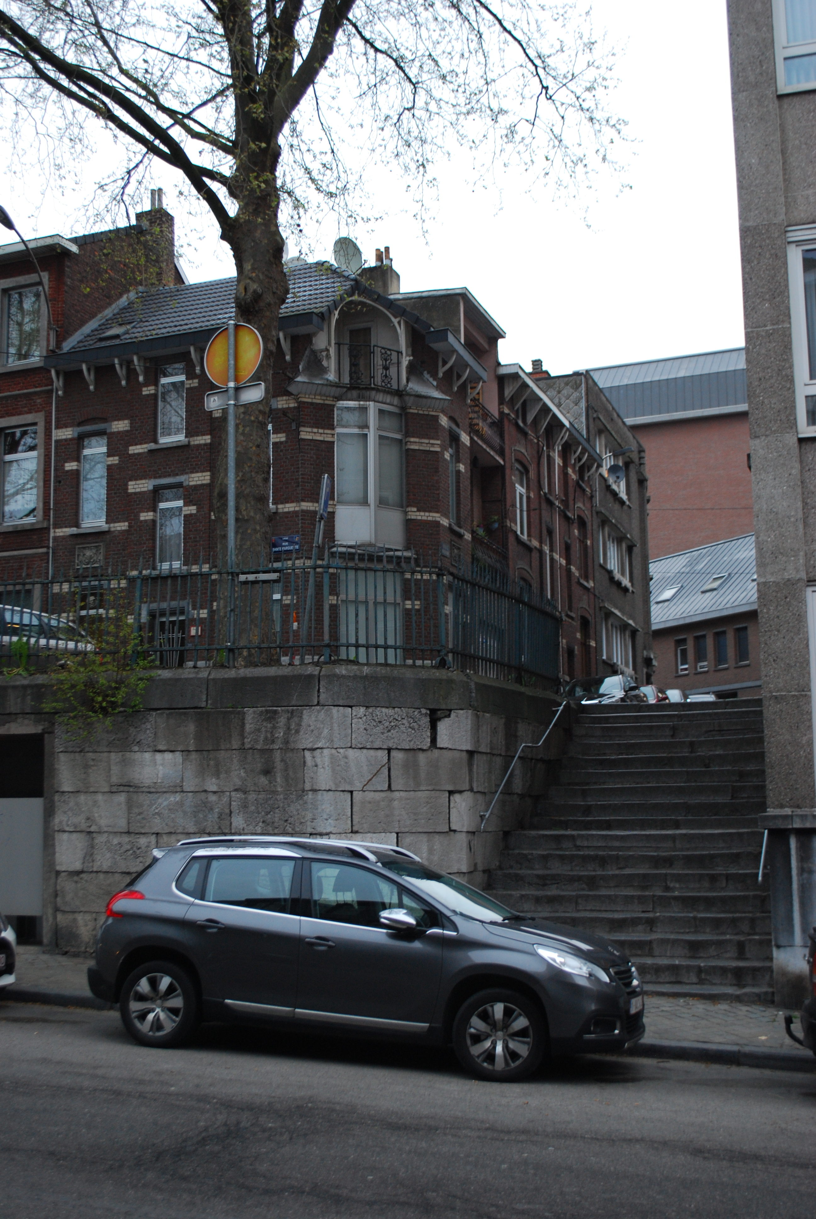 Vue du quartier Sainte-Marguerite à Liège, aux alentours de la clinique Saint-Joseph